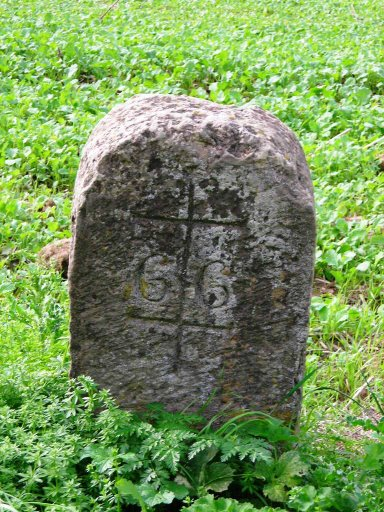 Borne près de la ferme Saint-Nicolas à Guerting (Moselle, France)